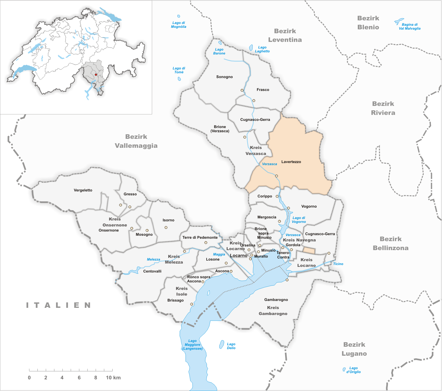 Municipality Lavertezzo